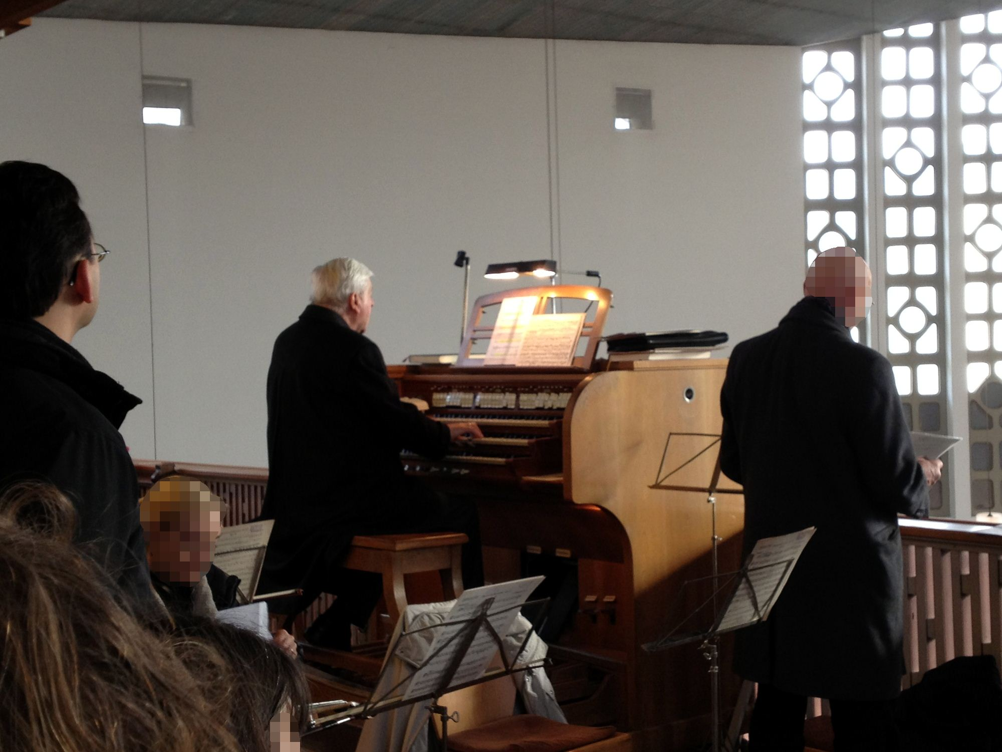 Hans Maier an der Orgel, Gottesdienst zu Weihnachten 2012 in der Kirche Maria Immaculata, München Harlaching